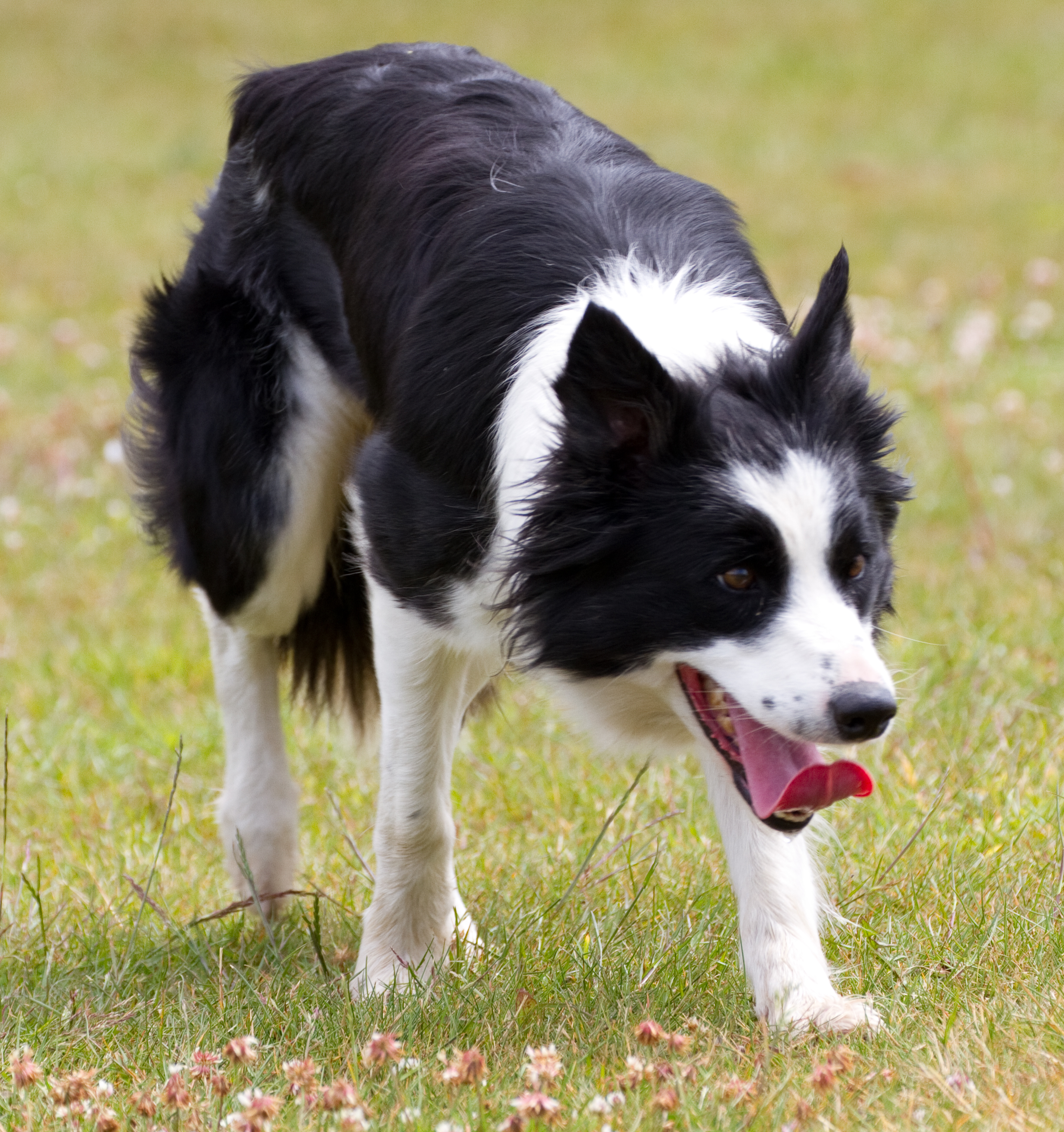 Sheepdog